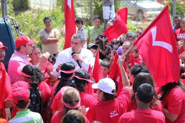 Otto Guevara y Movimiento Libertario en mitín.